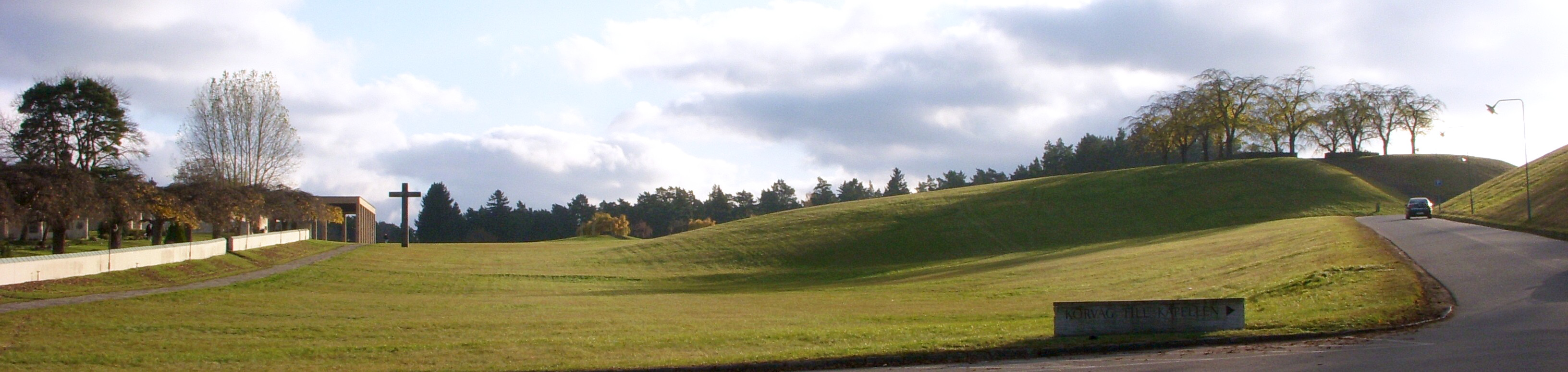 Skogskyrkogården i Stockholm, landskapet med Meditationslunden och granitkorset